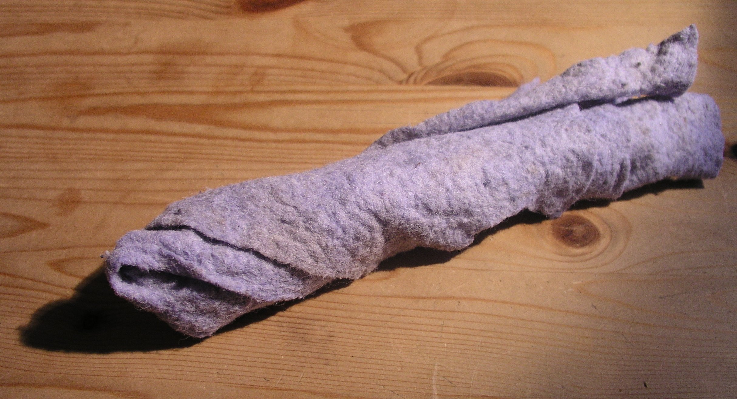 Opvredet karklud